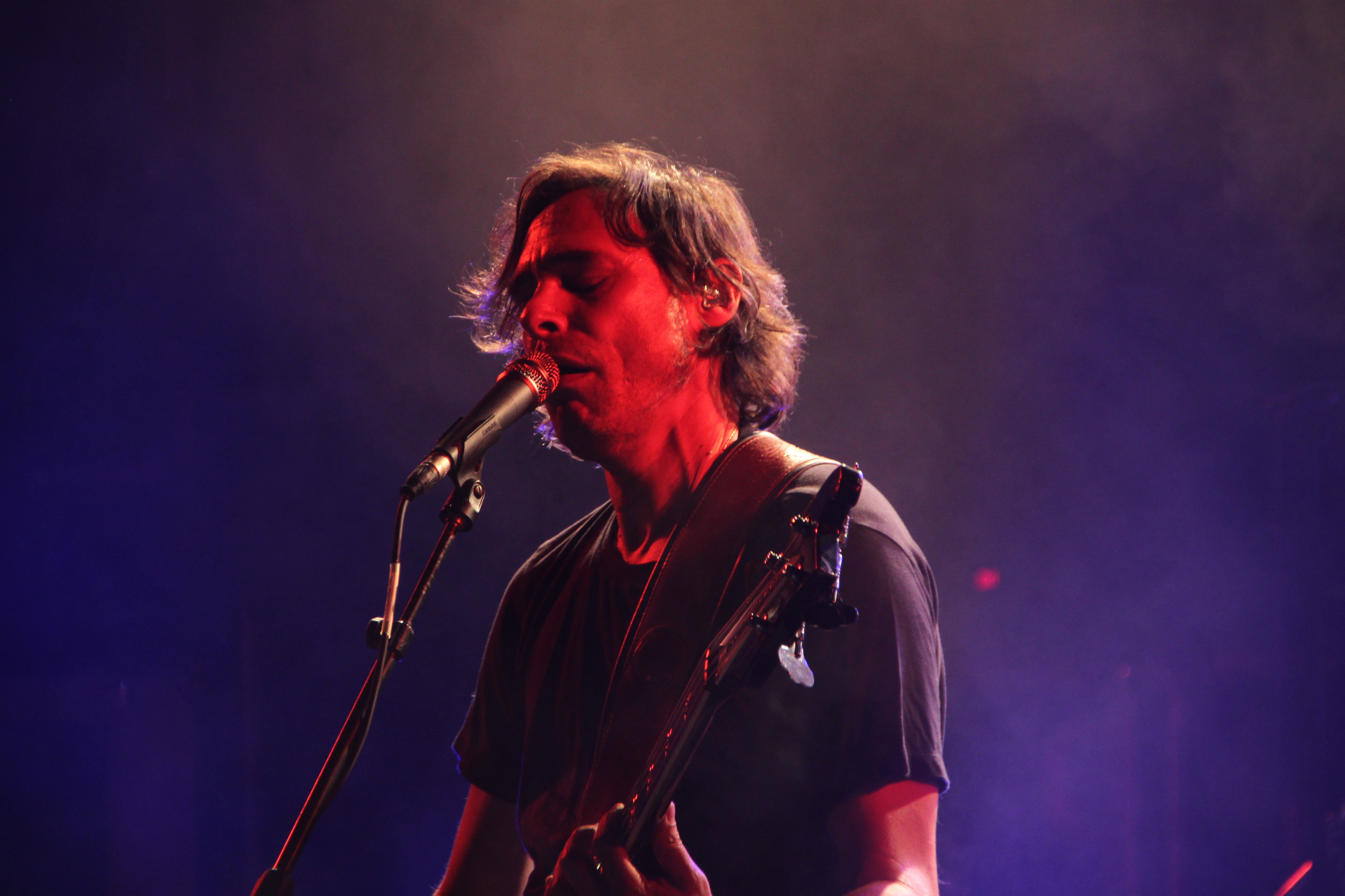 חמי רודנר בהופעה